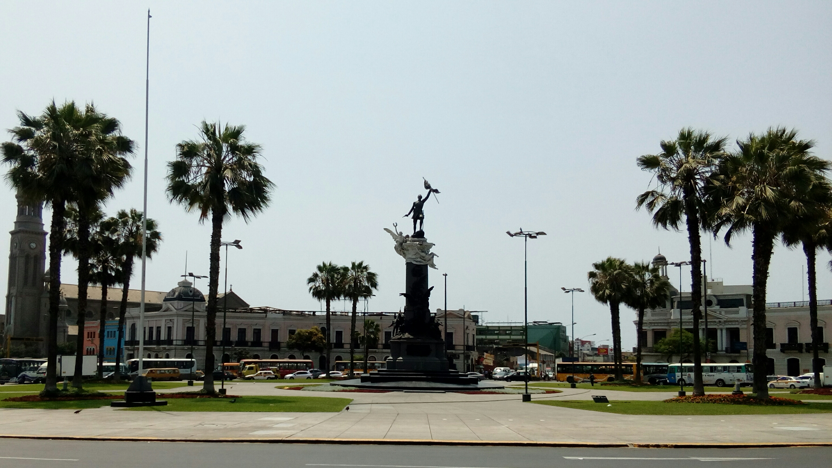 La plaza Bolognesi en el 2017.